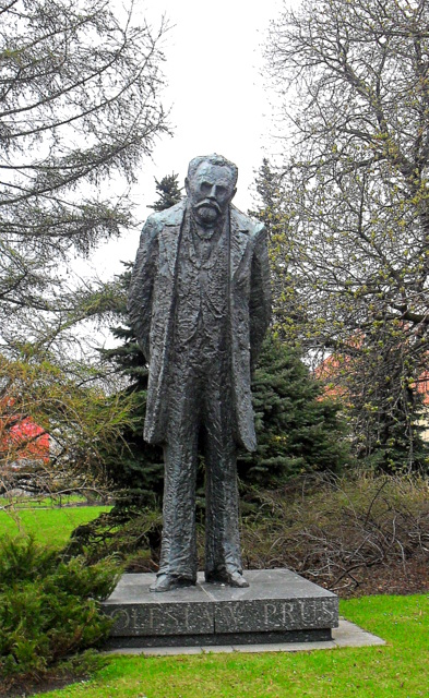 Warszawa, pomnik Bolesława Prusa